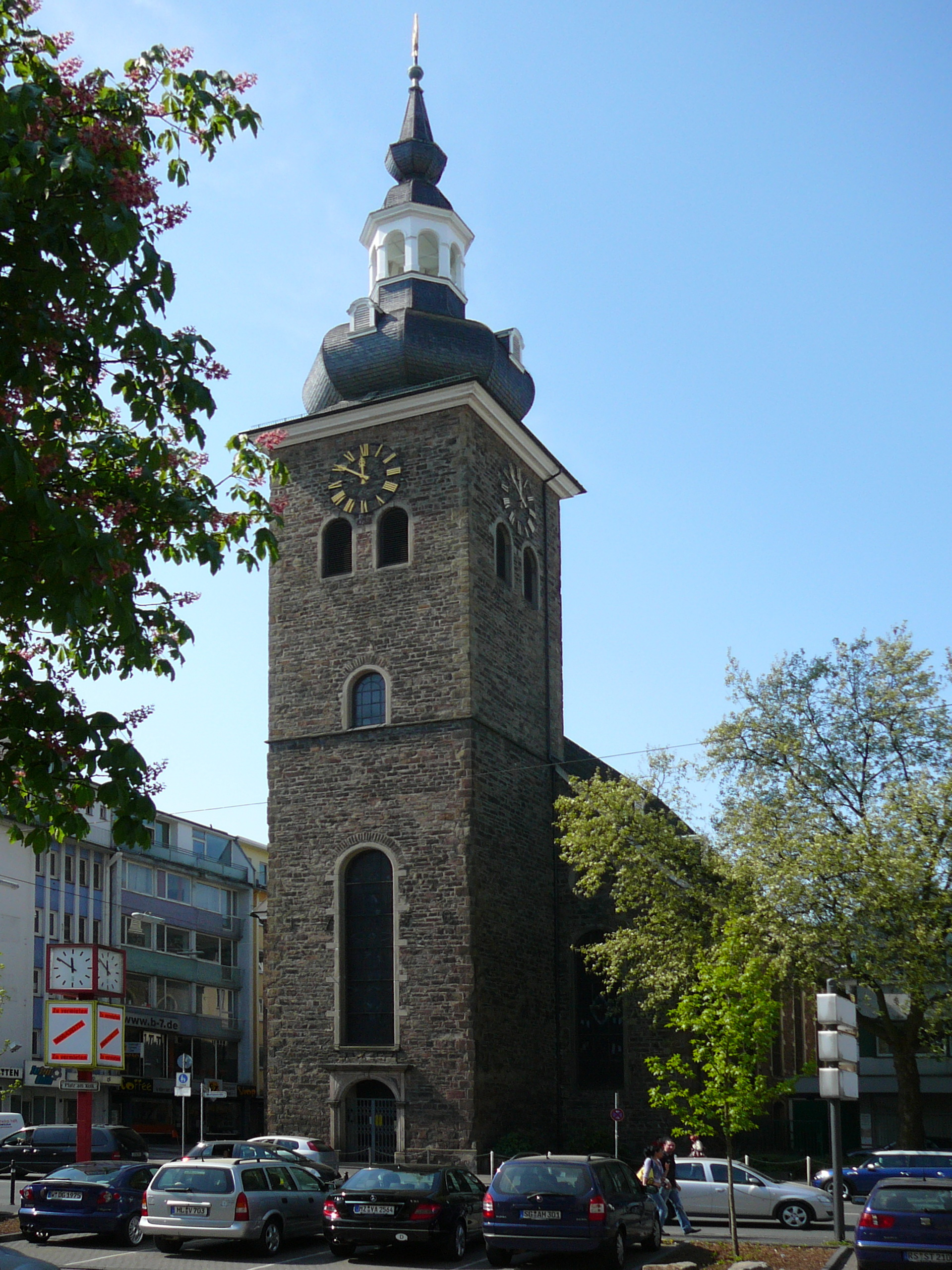 Platz am Kolk, Wuppertal